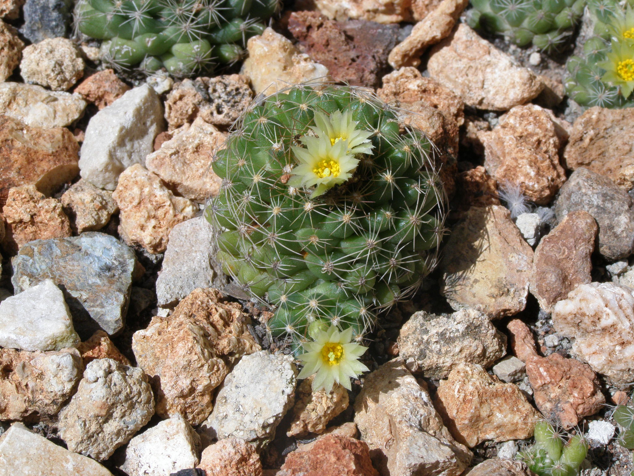 cactus endemico de la provincia de holguin cuba